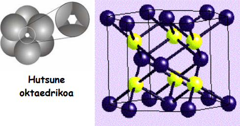 Paketatze hexagonal trinkoan dauden hutsune oktaedrikoak